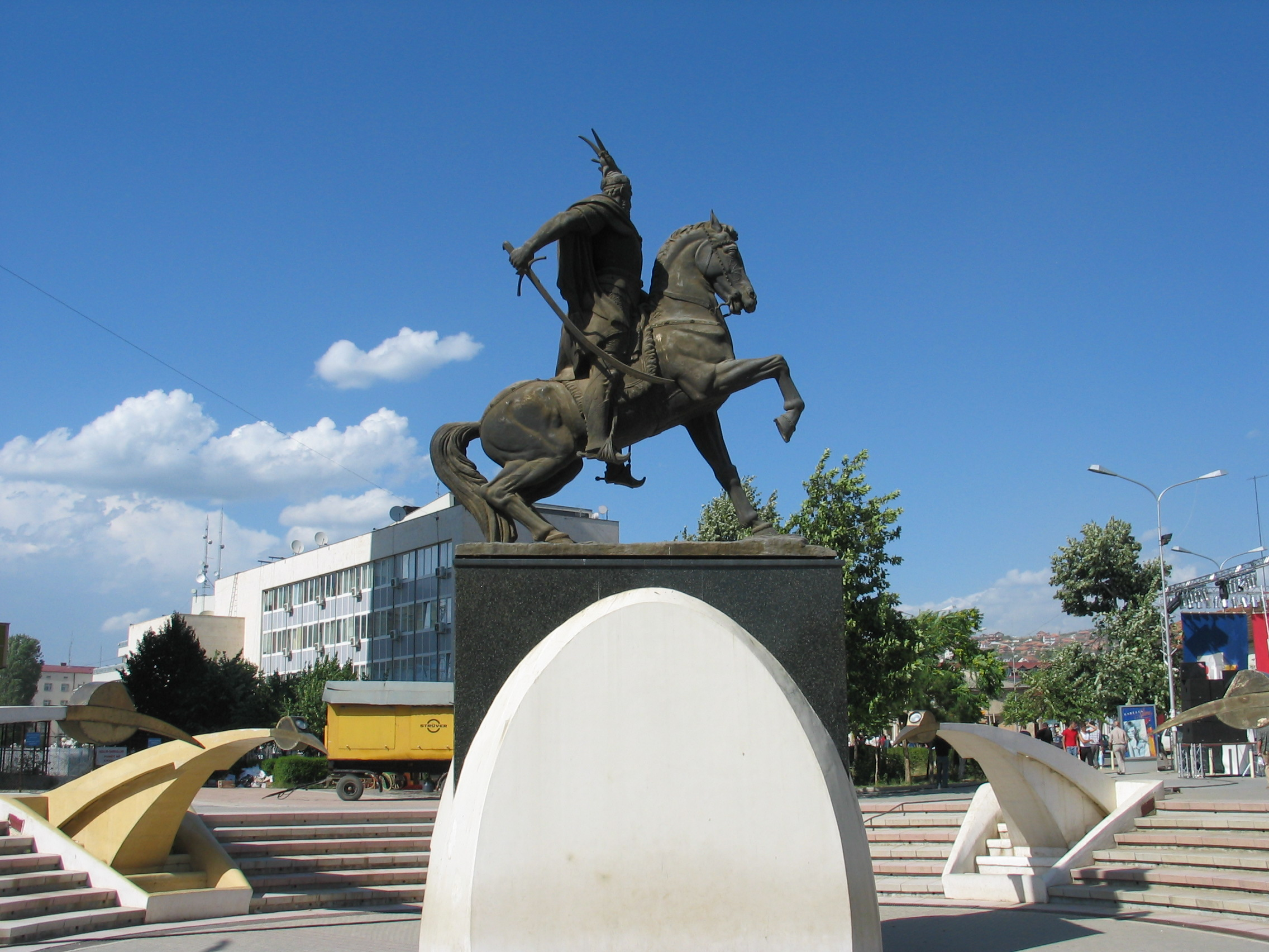 Monumenti i Skenderbeut në qender të Prishtinës, kryeqytetit të Kosovës. Fotografia reflekton qetësinë në prapavijë të shprehur me ngjyrën e kaltërt të qiellit mbi Kosovë, qetësi që pasonë pas një lufte të ashpër që në fotografi paraqite me pozitën e kalit dhe kalorsit i cili e mbanë shpatën si të ishte në vrazhden më të madhe të betejes.